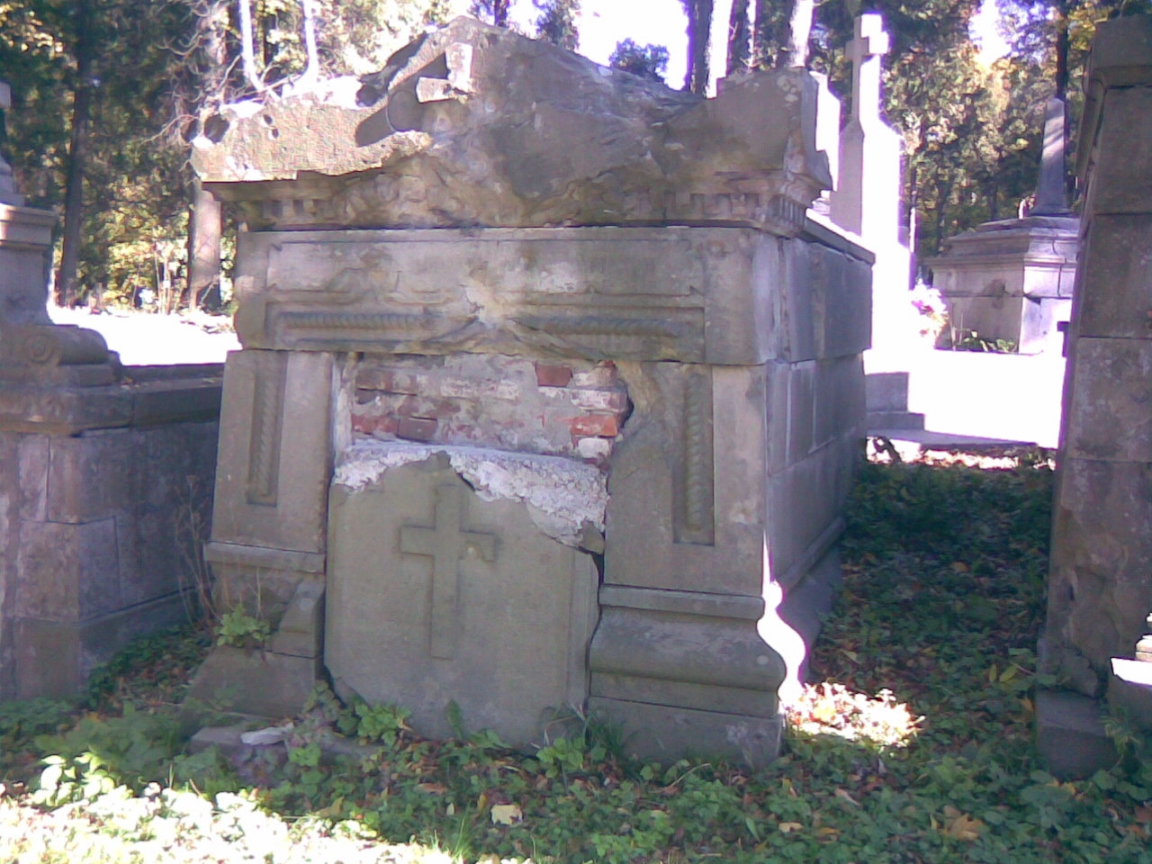 Henryk Rewakowicz, grób, Cementarz Łyczawkowski, Lwów